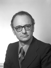 politico italiano